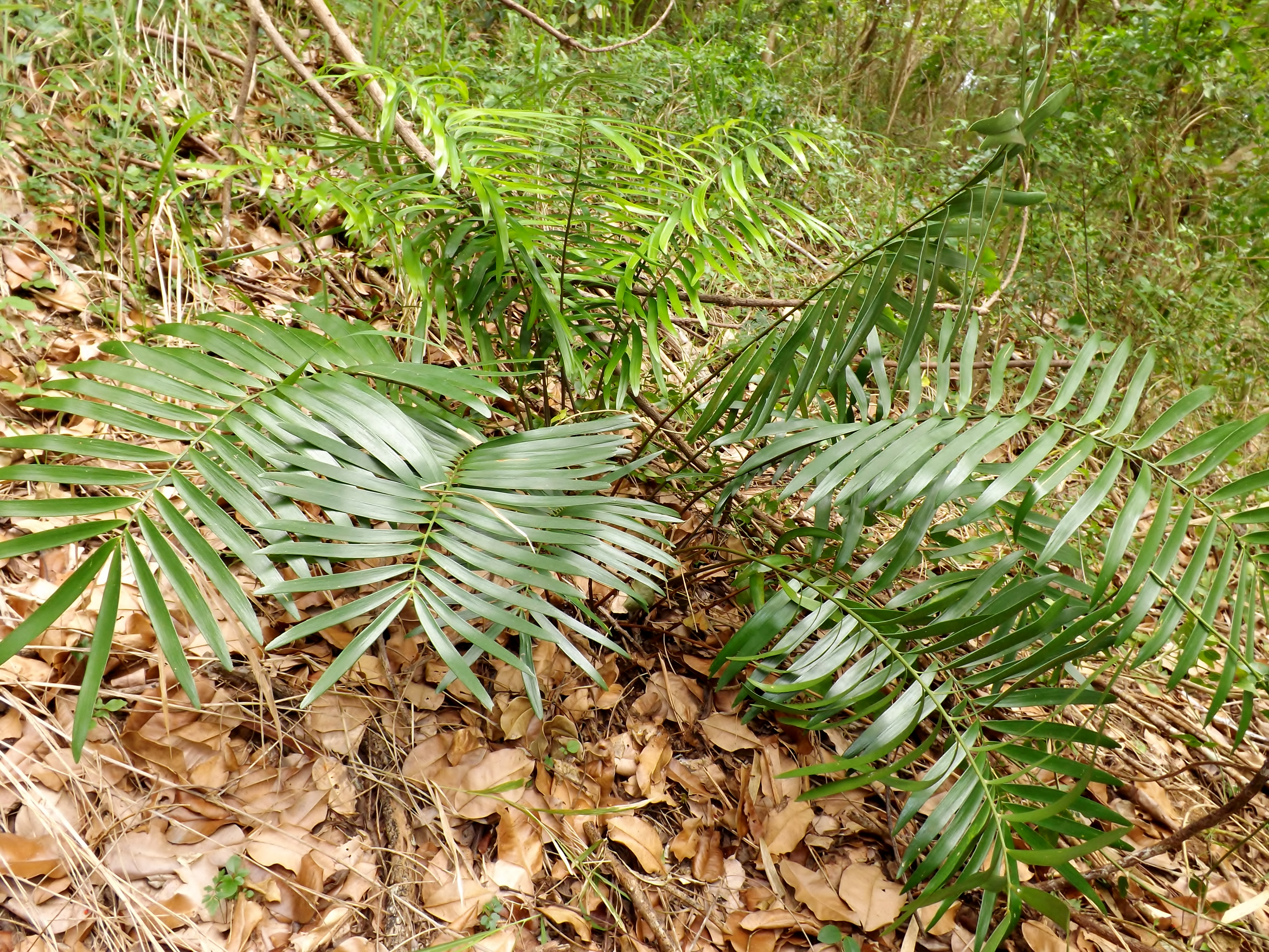 Hábito de Zamia pumila. Peñuelas, Puerto Rico